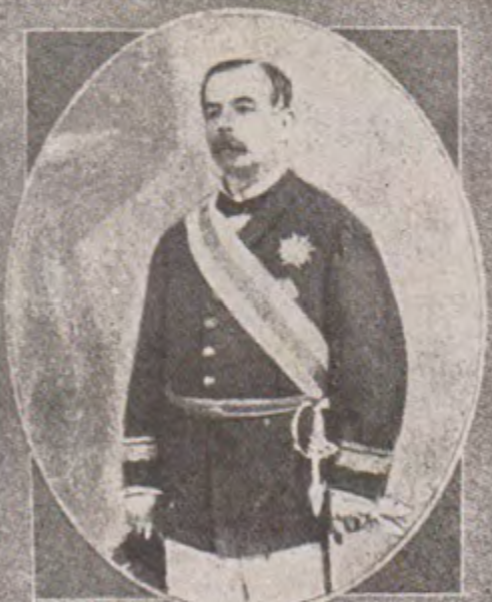 Carlos de Vargas y Cerveto